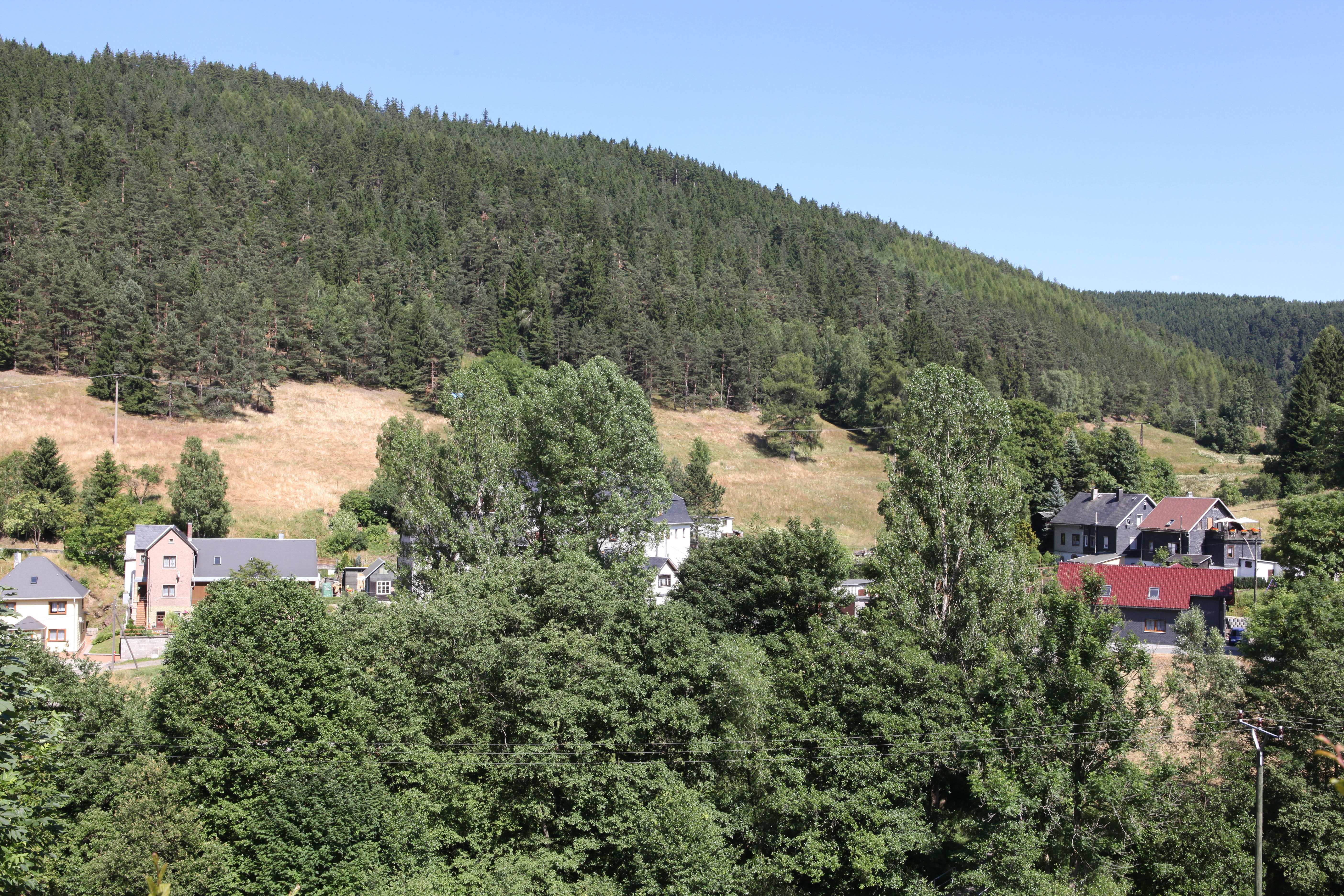 Lamprecht, Teil von Wallendorf im Ort Lichte